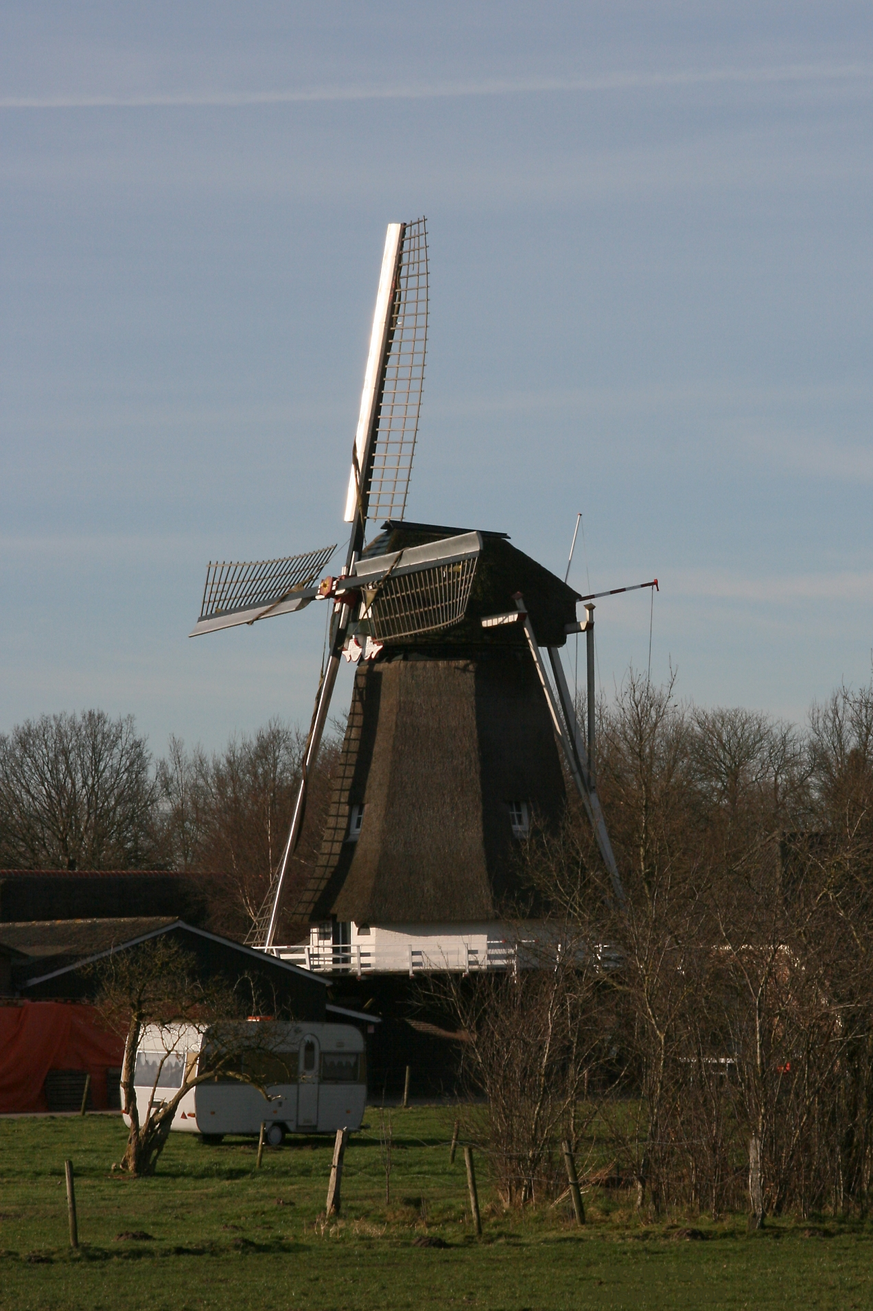 Wachtum: windmolen De Hoop